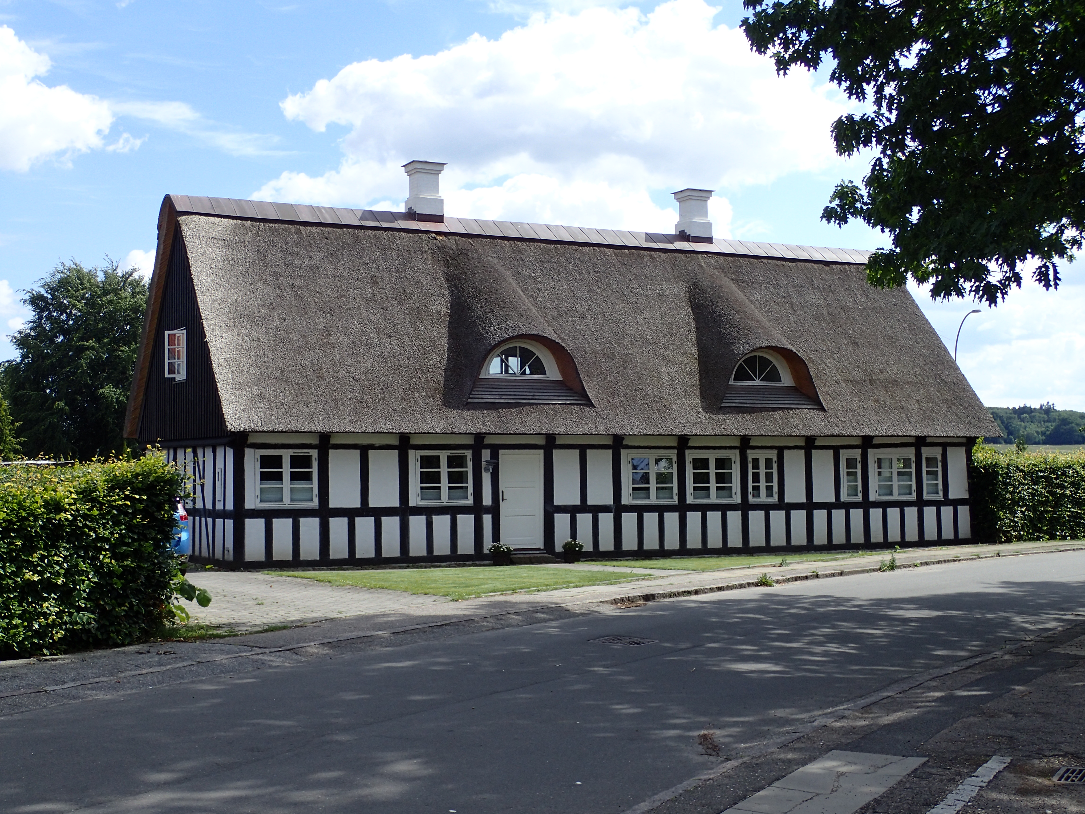 Bindingsværket Præsteenkesædet på Tværvej i Gammel Brabrand.